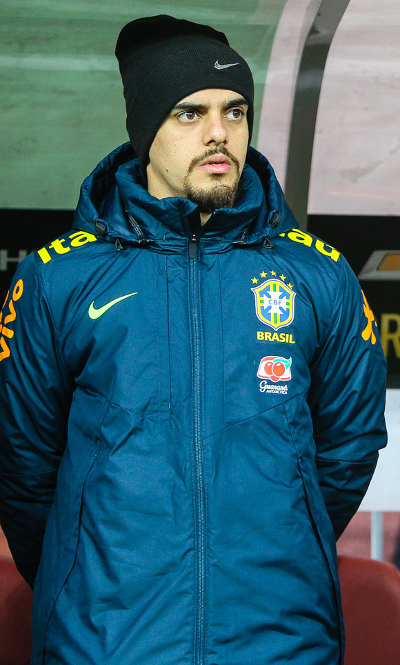 Россия проиграла Бразилии со счетом 0:3